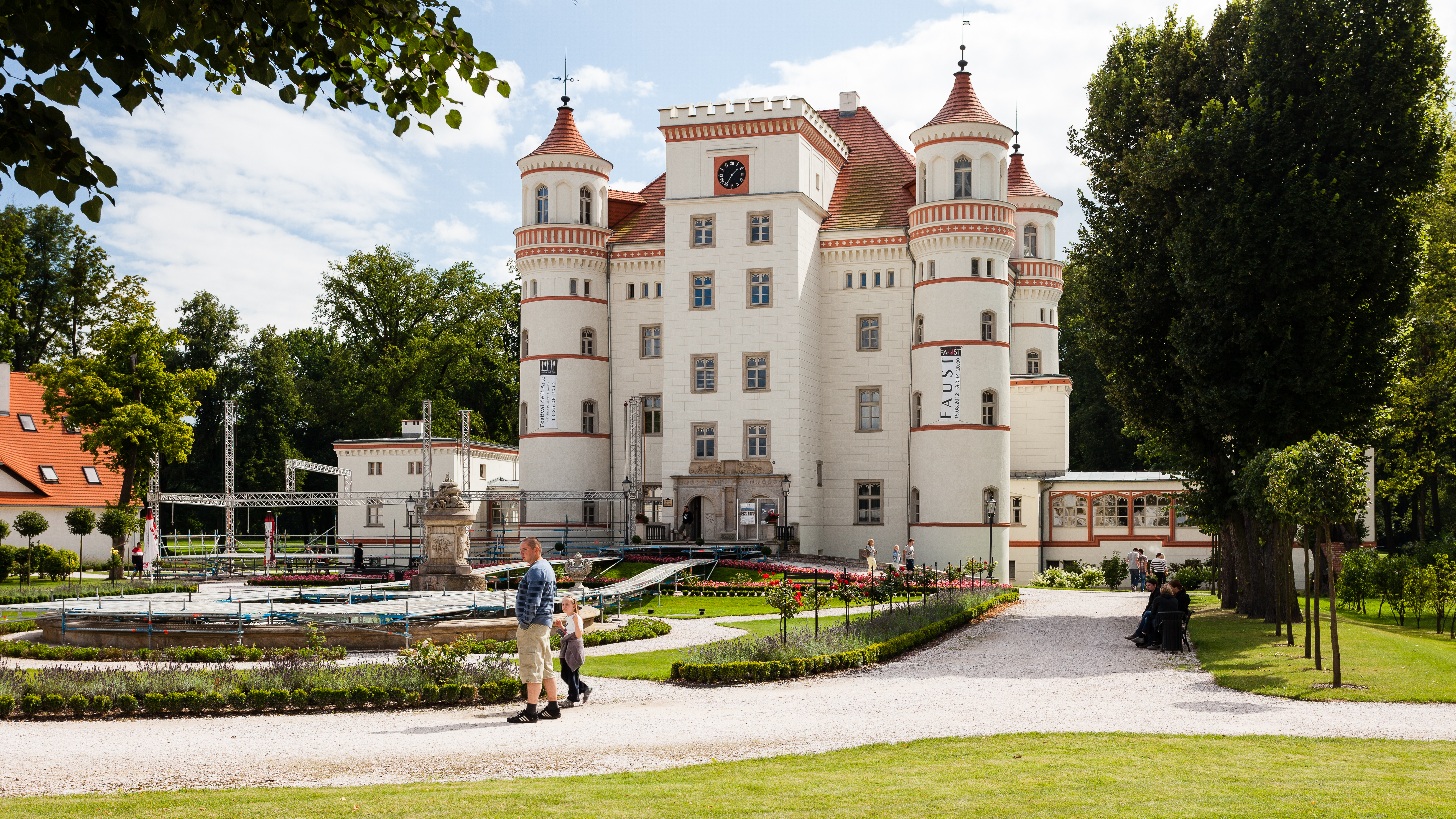 Zespół pałacowy i folwarczny: pałac